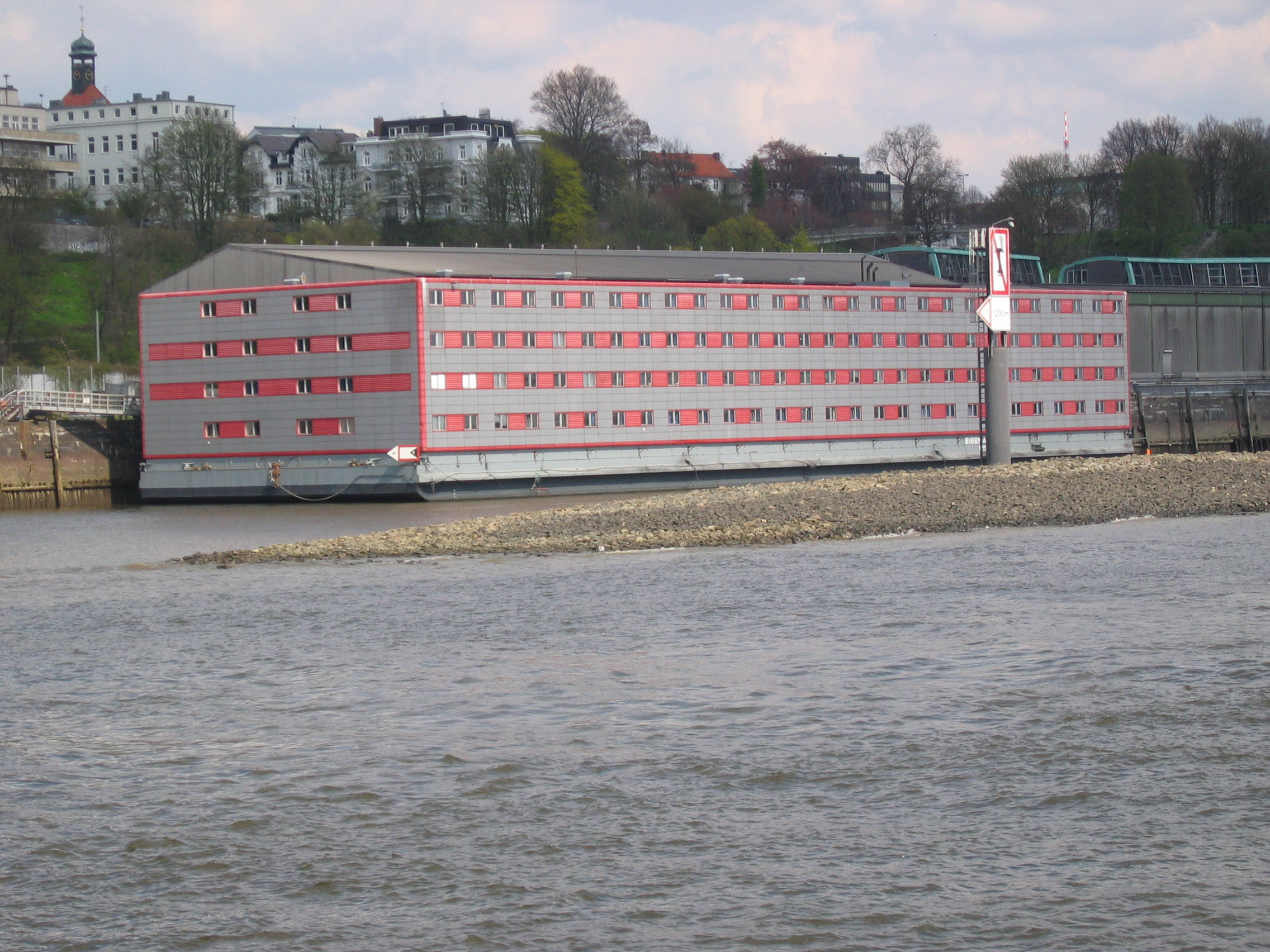 Botel in Hamburg Barka Bibbi Altona w Hamburgu